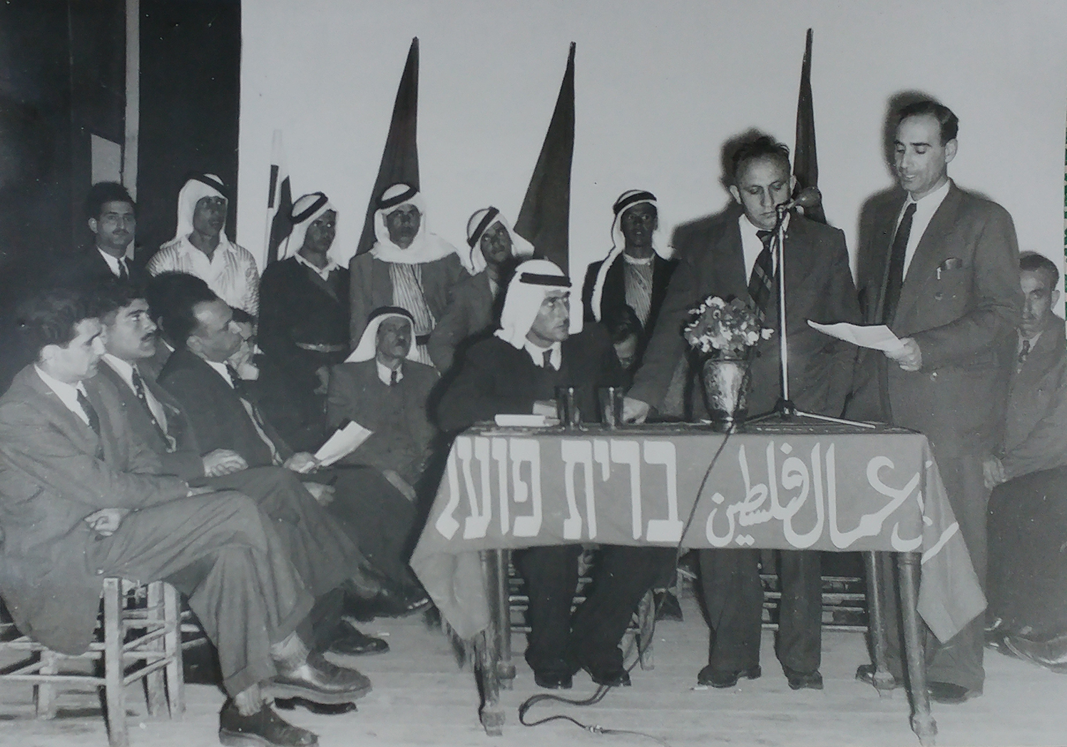 שנות החמישים - תמונה של אליהו עם ראובן ברקת בכנס בפא"י, כנראה ביפו